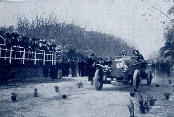 Fiestas de Invierno, Málaga, España 1915